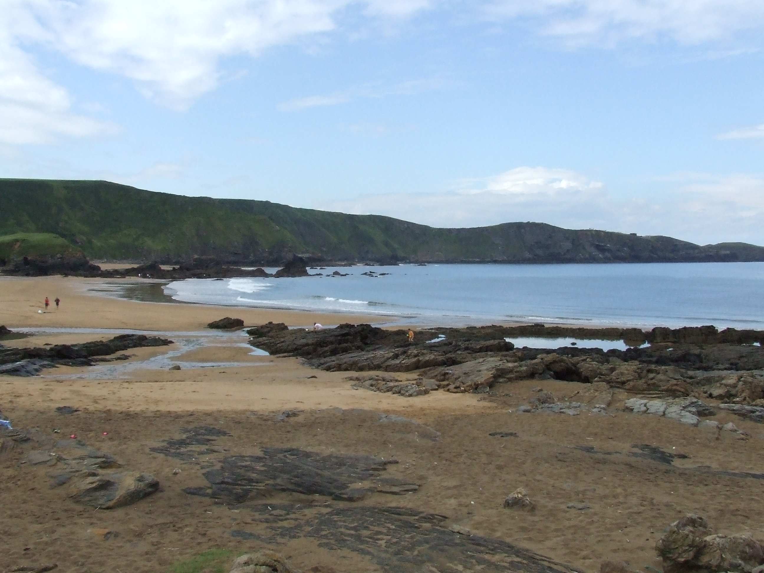 Playas de Verdicio: Tenrero